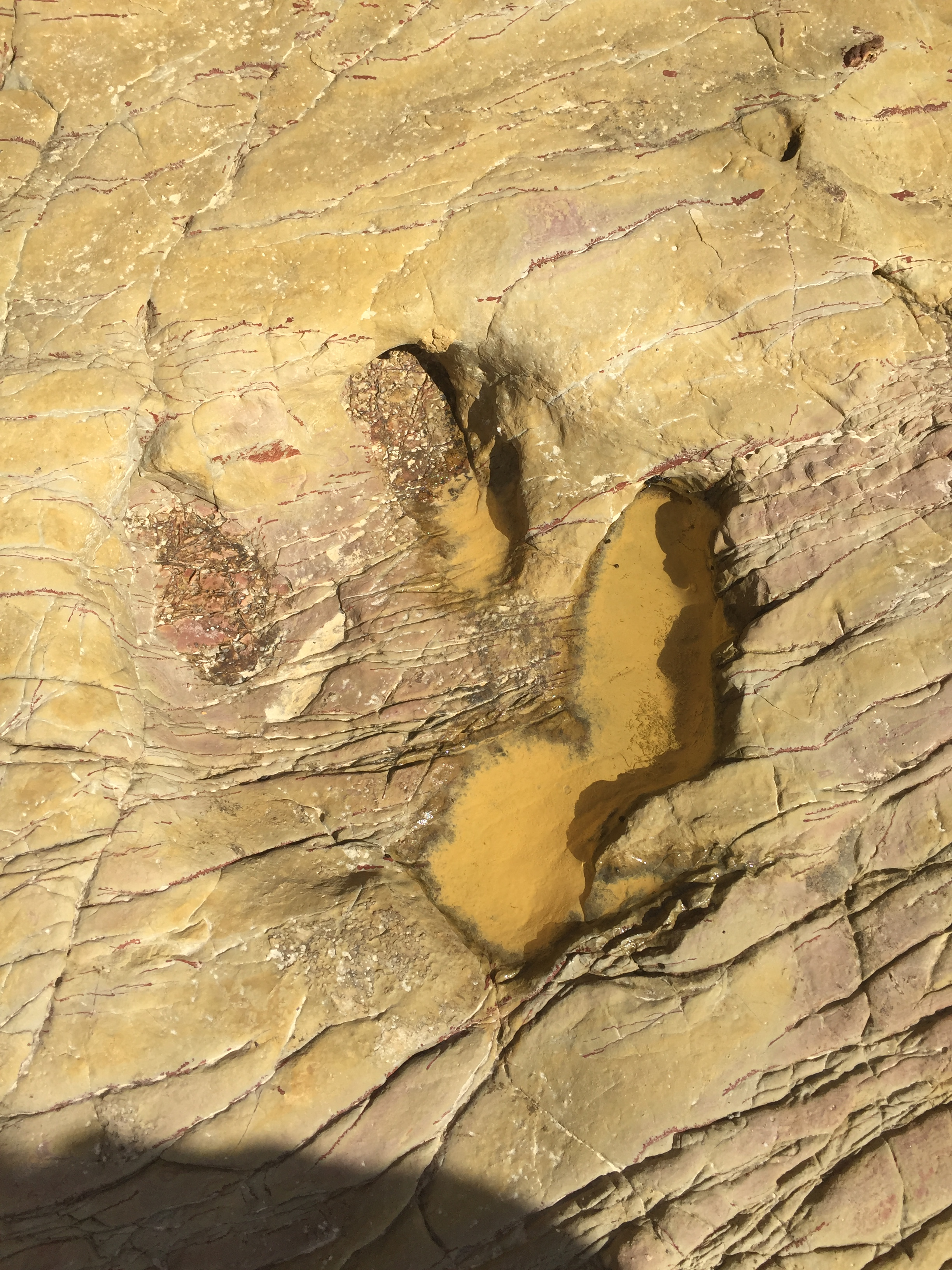 Spur eines Dinosauriers der Unterordnung Theropode am Strand von Salema.